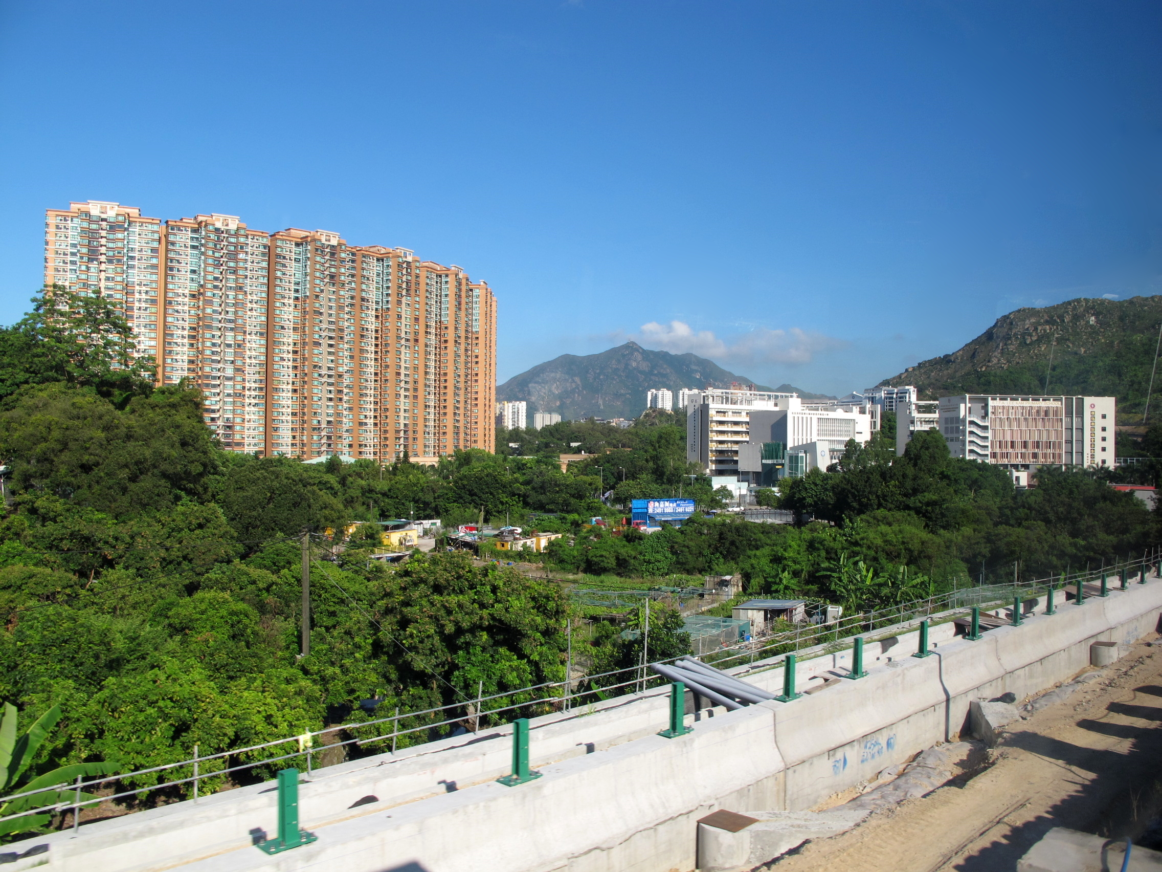 So Kwun Tan